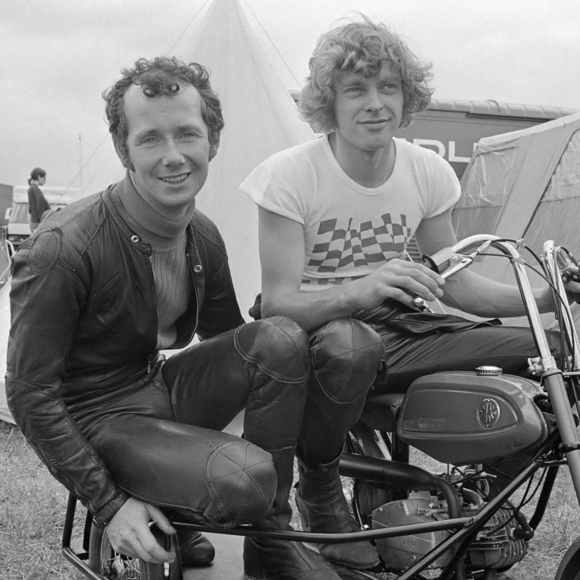 Nederlandse motorcoureurs Jan de Vries (l) en Jos Schurgers na de training 23 juni 1971